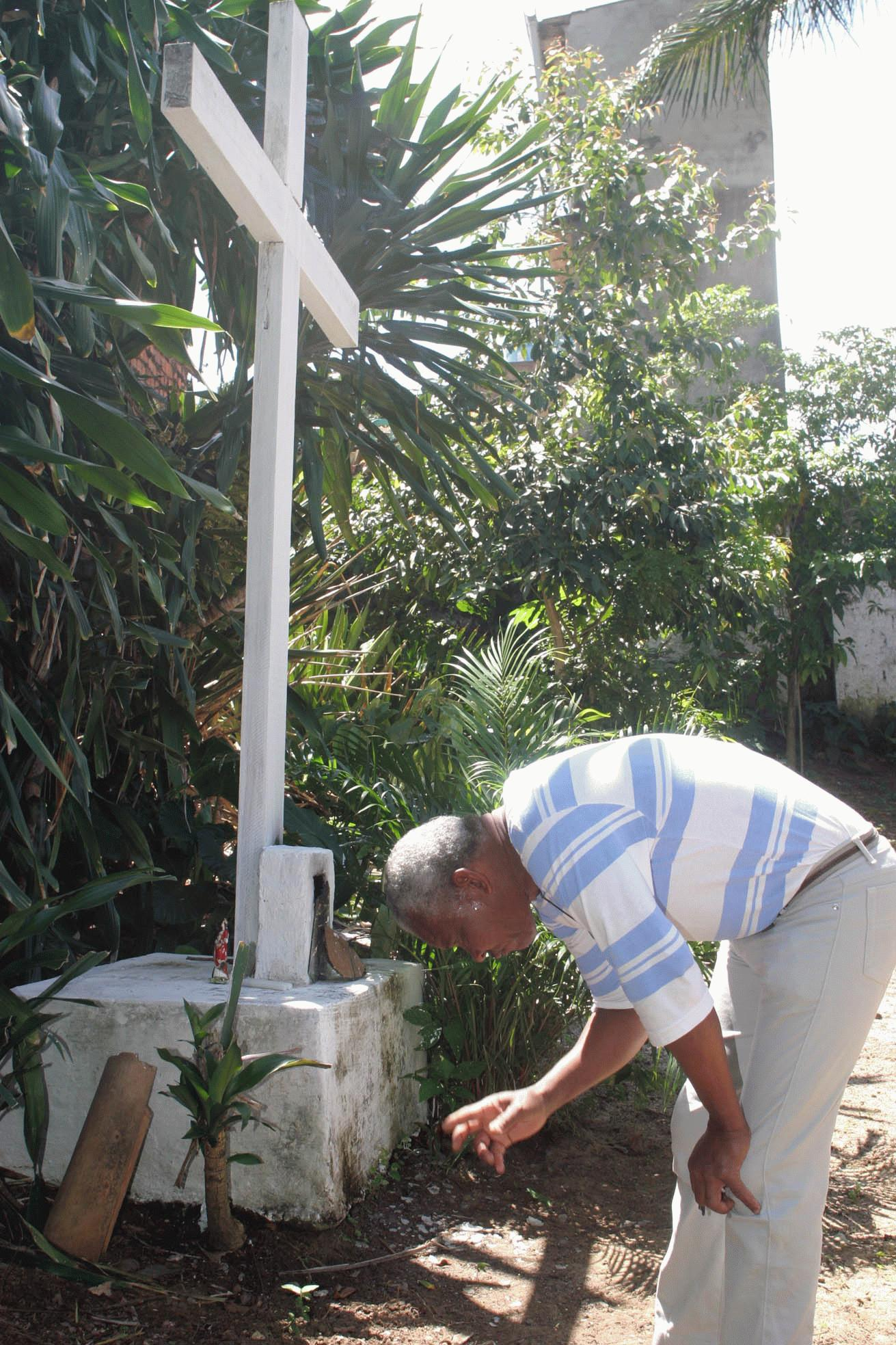 Reverência de Miltinho aos antepassados do Terreiro Ilê Axé Opô Afonjá em Salvador, Bahia